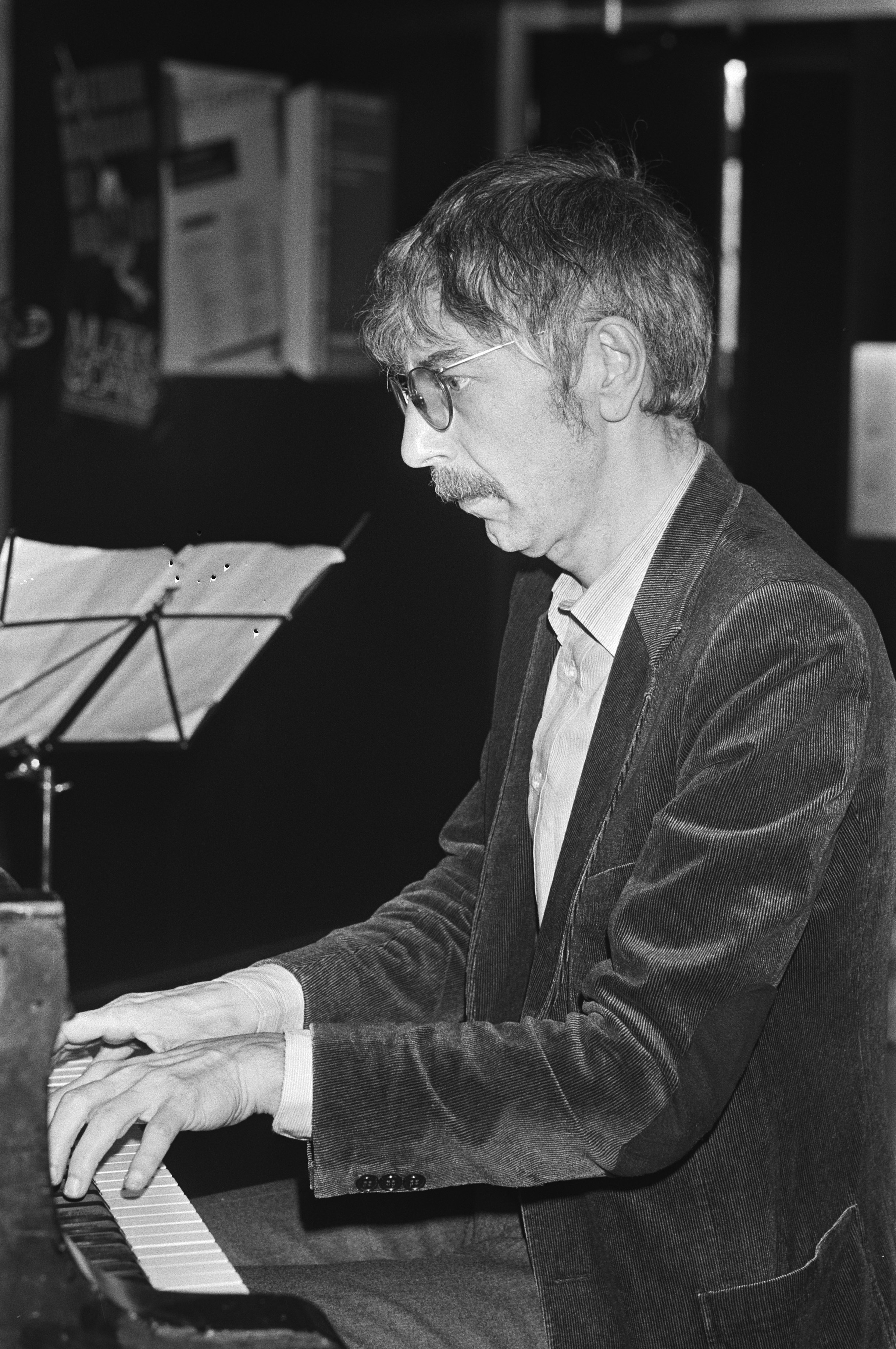 Collectie / Archief : Fotocollectie Anefo Reportage / Serie : Musici in actie Beschrijving : Pianist Reinbert de Leeuw Datum : 3 mei 1983 Trefwoorden : musici, piano's Persoonsnaam : Leeuw, Reinbert de Fotograaf : Croes, Rob C. / Anefo Auteursrechthebbende : Nationaal Archief Materiaalsoort : Negatief (zwart/wit) Nummer archiefinventaris : bekijk toegang 2.24.01.05 Bestanddeelnummer : 932-5810